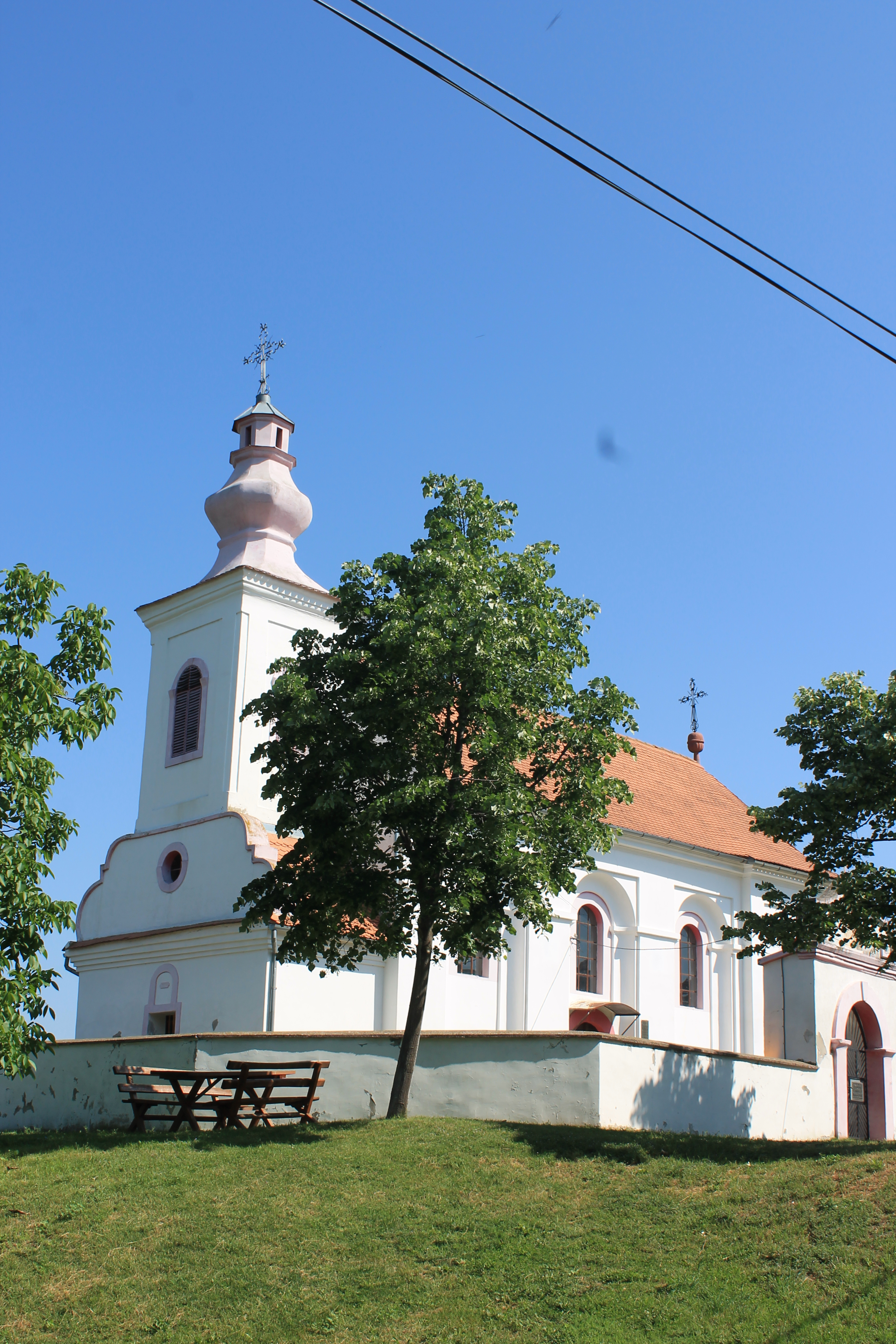 Crkva Sv. Georgija (Banoštor)